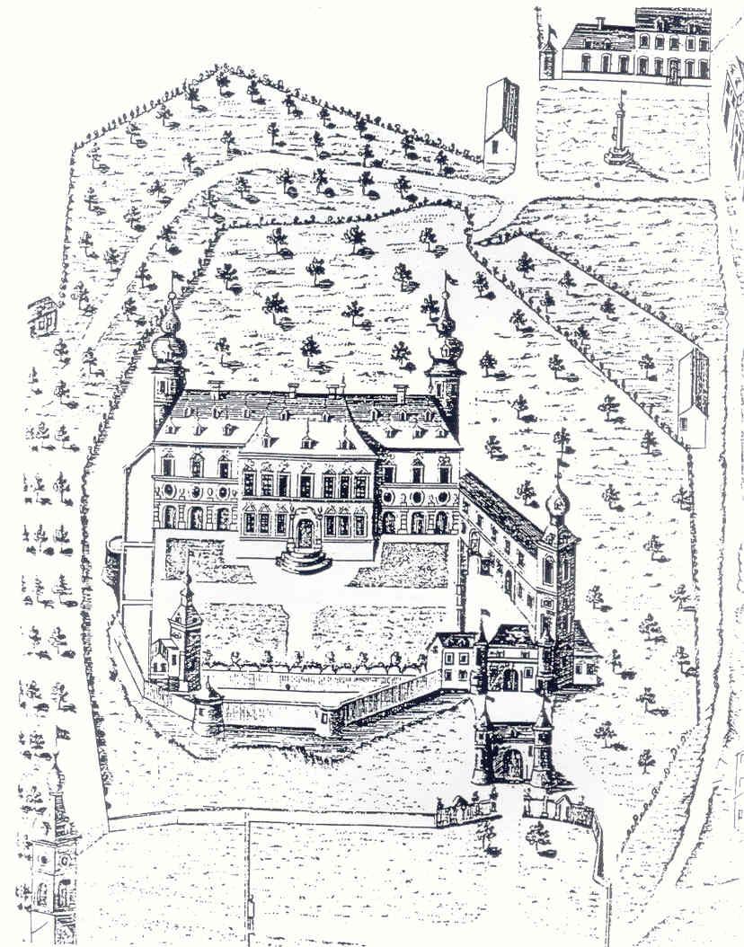 Plan ancien du chateau de Trazegnies